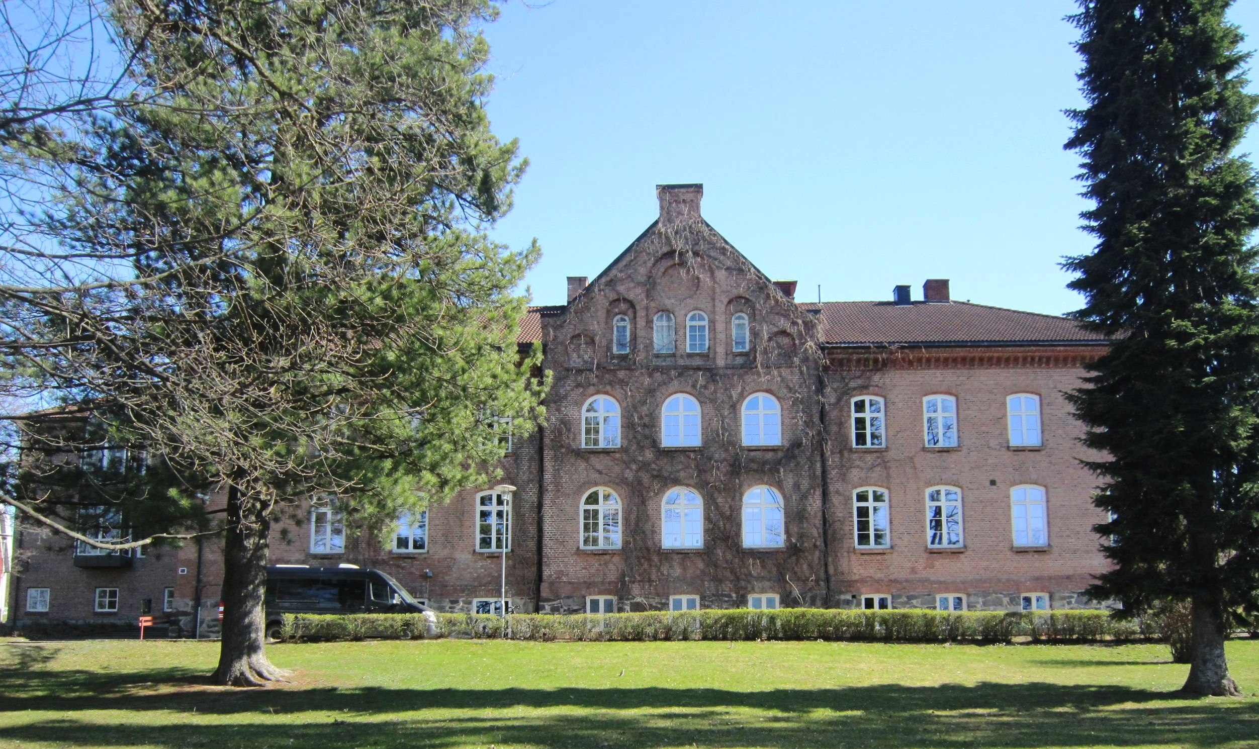 Lillehammer videregående skole